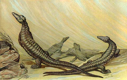 Aetosaurus.